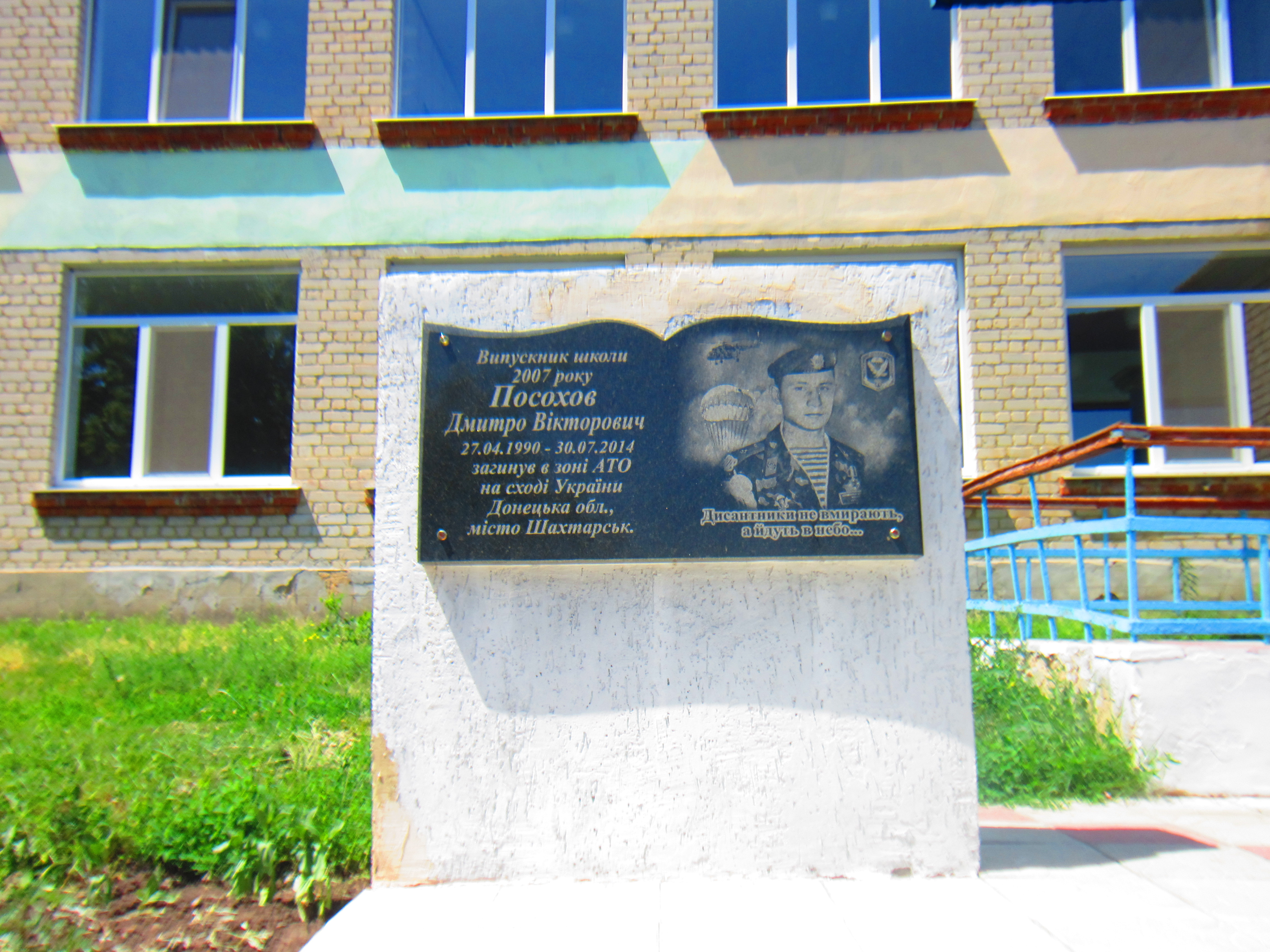 Вікіекспедиція до Великобурлуцької громади. Плоске, 15 червня 2019 року.Меморіальна дошка у пам'ять Дмитра Вікторовича Посохова (нар. 27 квітня 1990 — пом. 30 липня 2014 року), випускника Площанської загальноосвітньої школи І—ІІІ ступенів 2007 року, який загинув у зоні АТО на сході України поблизу м. Шахтарськ біля Площанського ліцею у с. Плоске Великобурлуцької селищної громади Харківської області. Дошка урочисто відкрита 30 липня 2016 року.